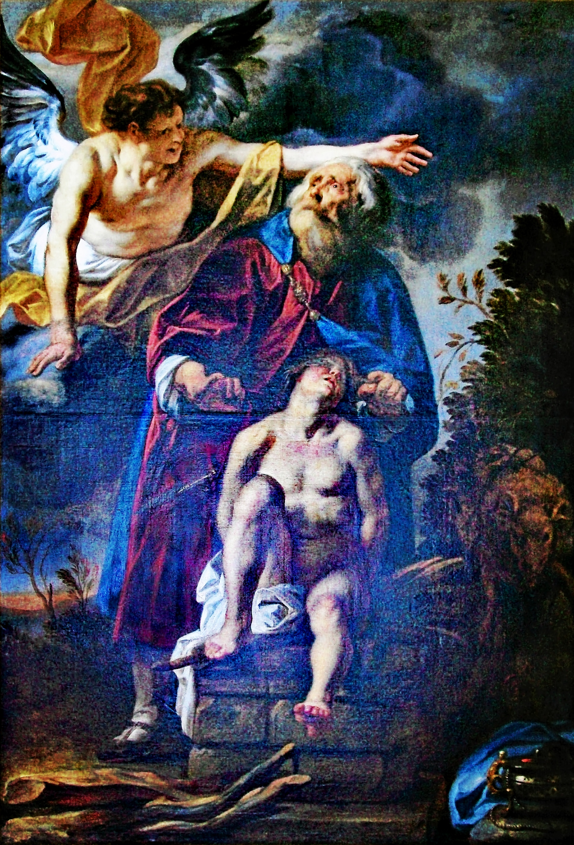 Binding of Isaac (Opferung Isaaks)